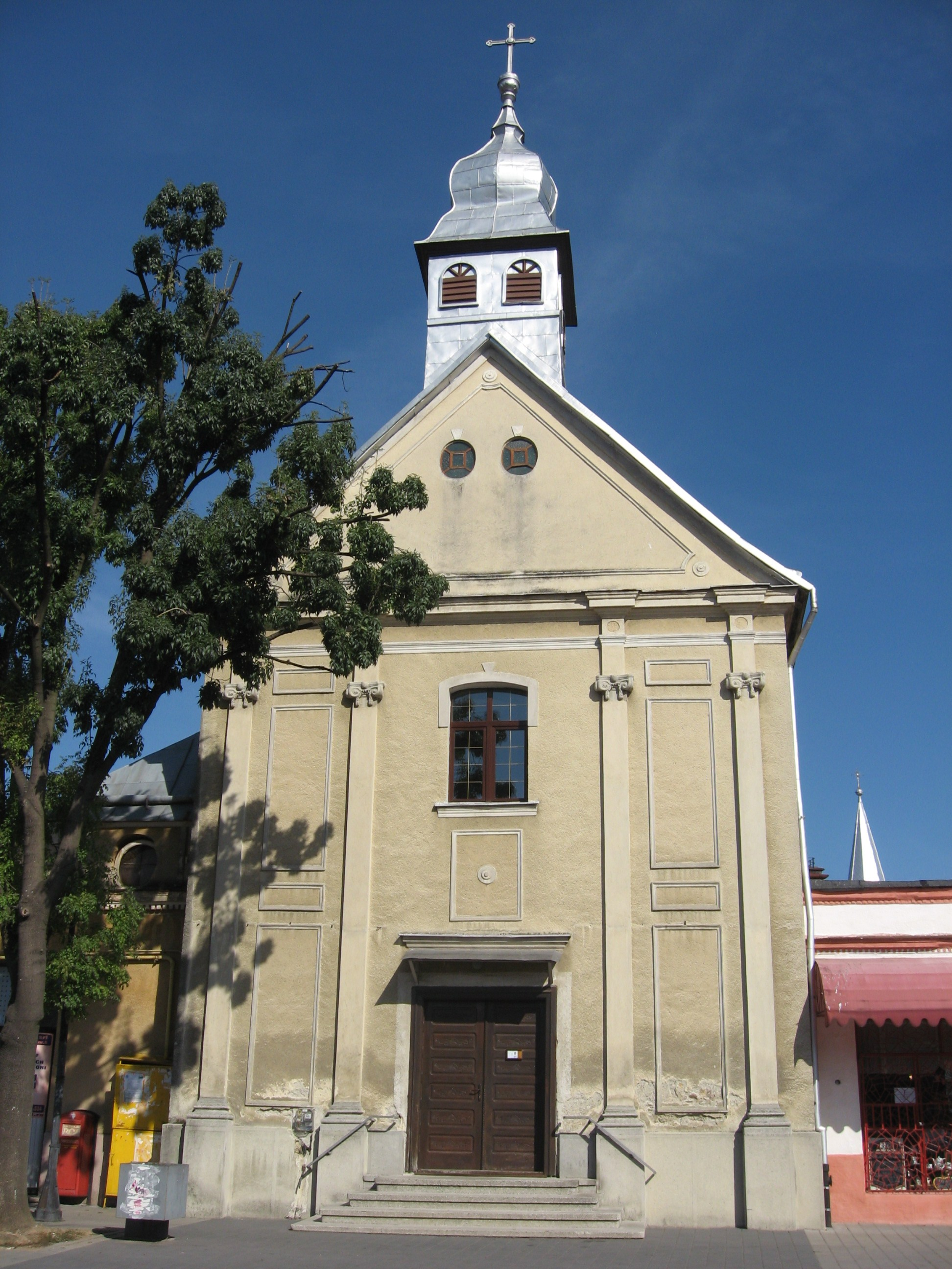 Aceasta e o imagine cu un monument istoric din România, clasificat cu numărul MM-II-m-A-04479.